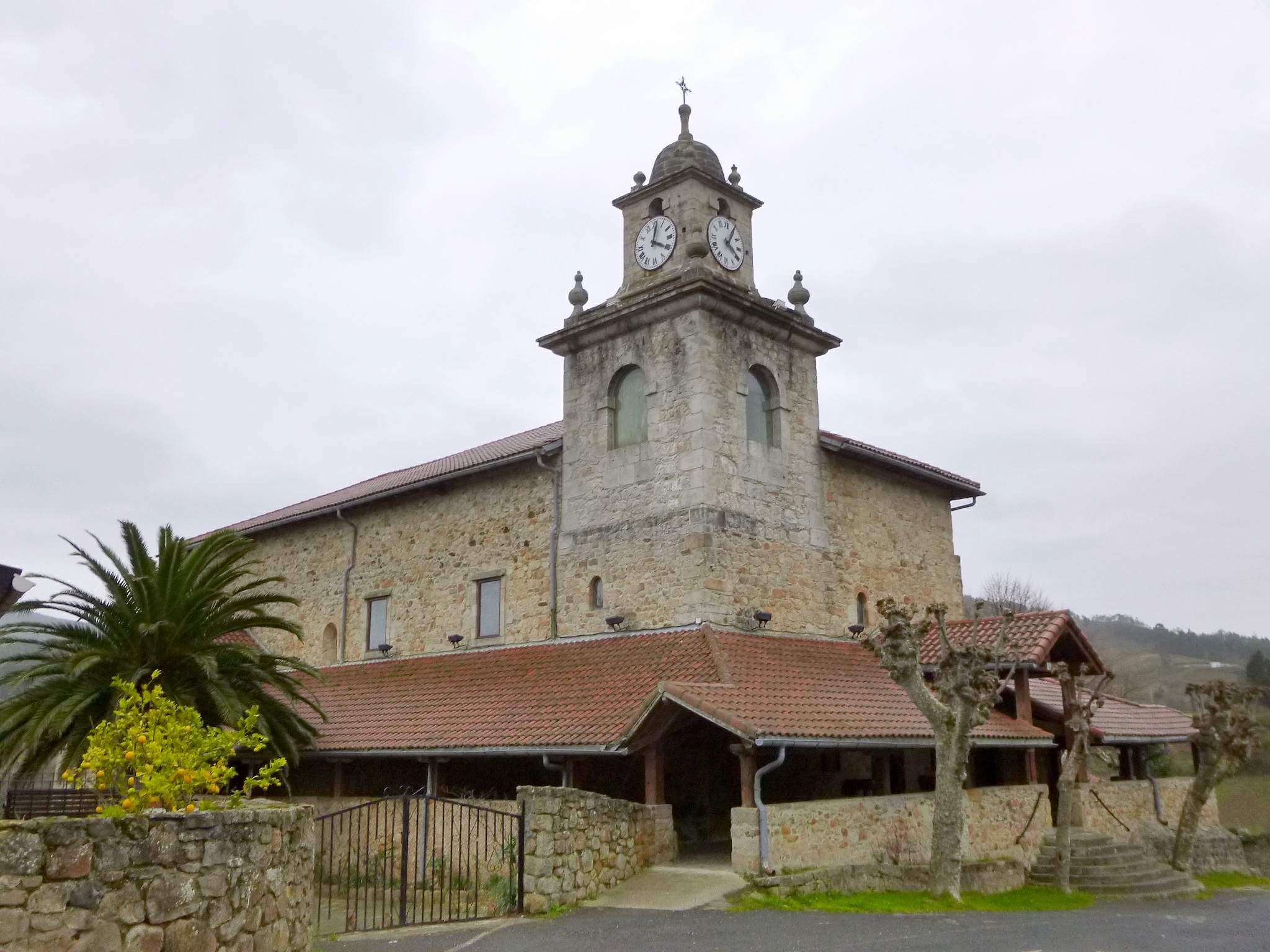 Iglesia de Andra Mari (Bakio, Bizkaia)